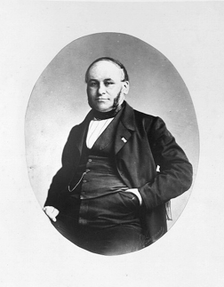 Cliché photographique de Léon Athanase Gosselin (circa 1850/1860).